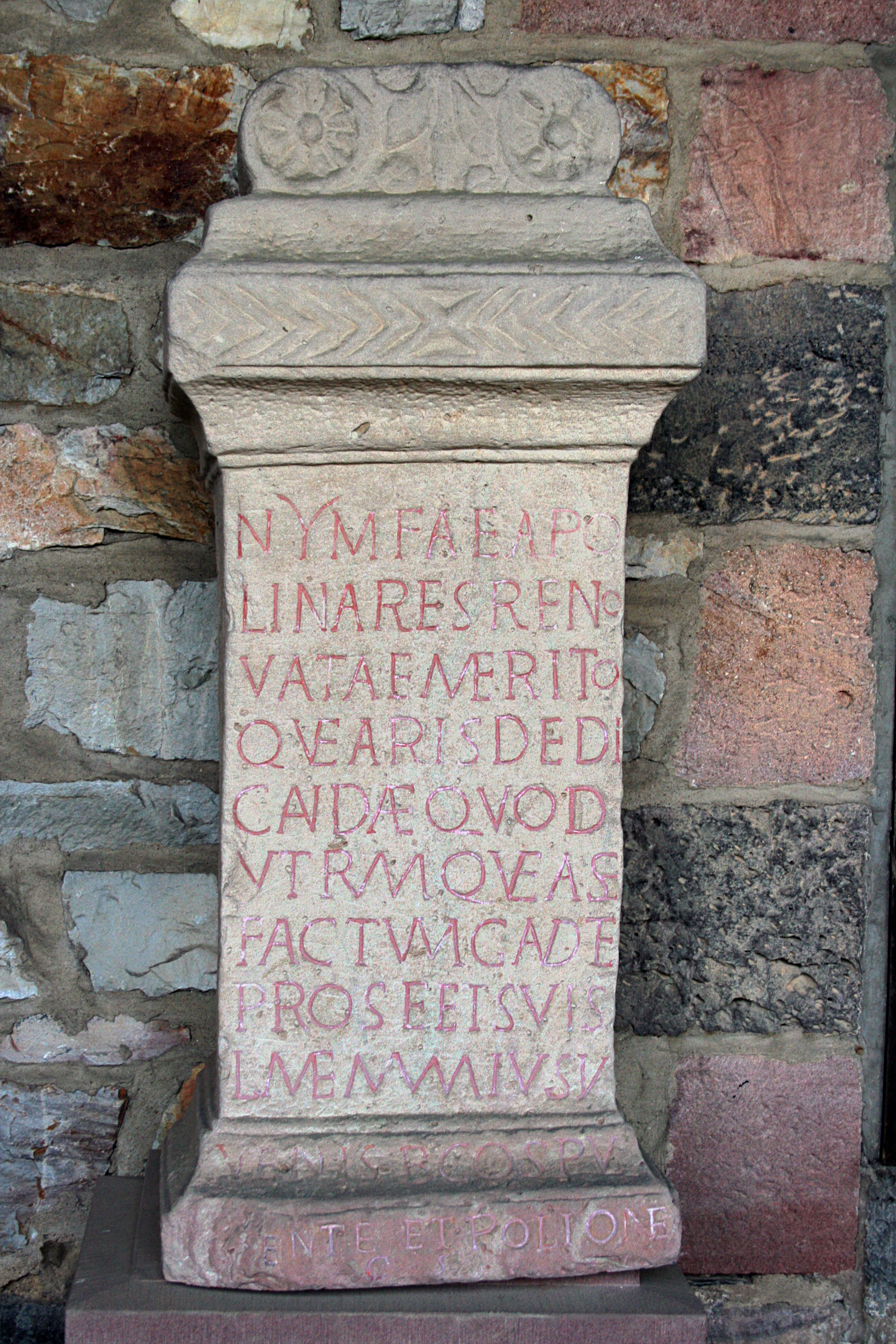 Weihestein für ein Nymphenheiligtum aus Stockstadt, ausgestellt im Saalburgmuseum Bad Homburg (CIL XIII, 06649).